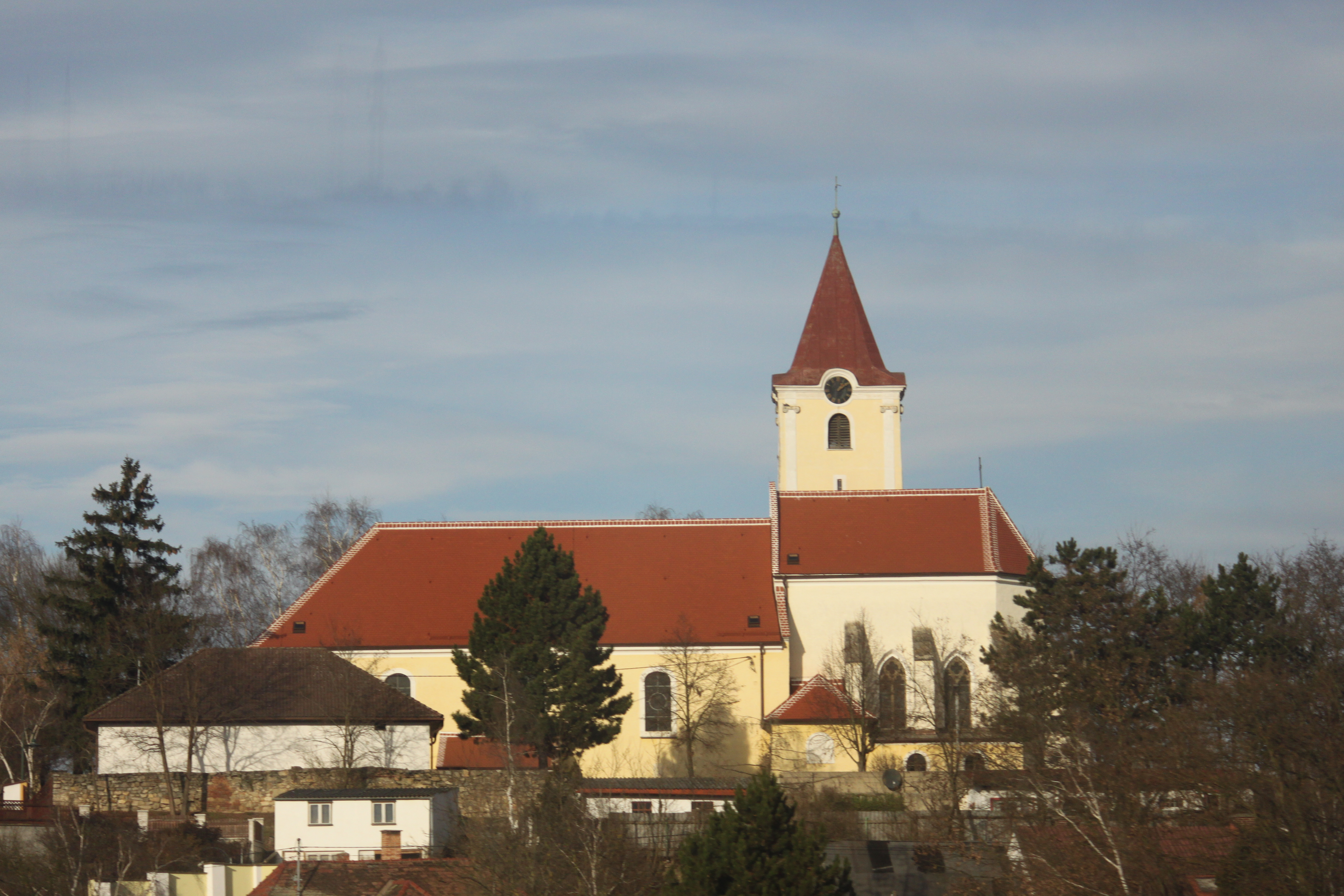 katholische Pfarrkirche heiliger Georg